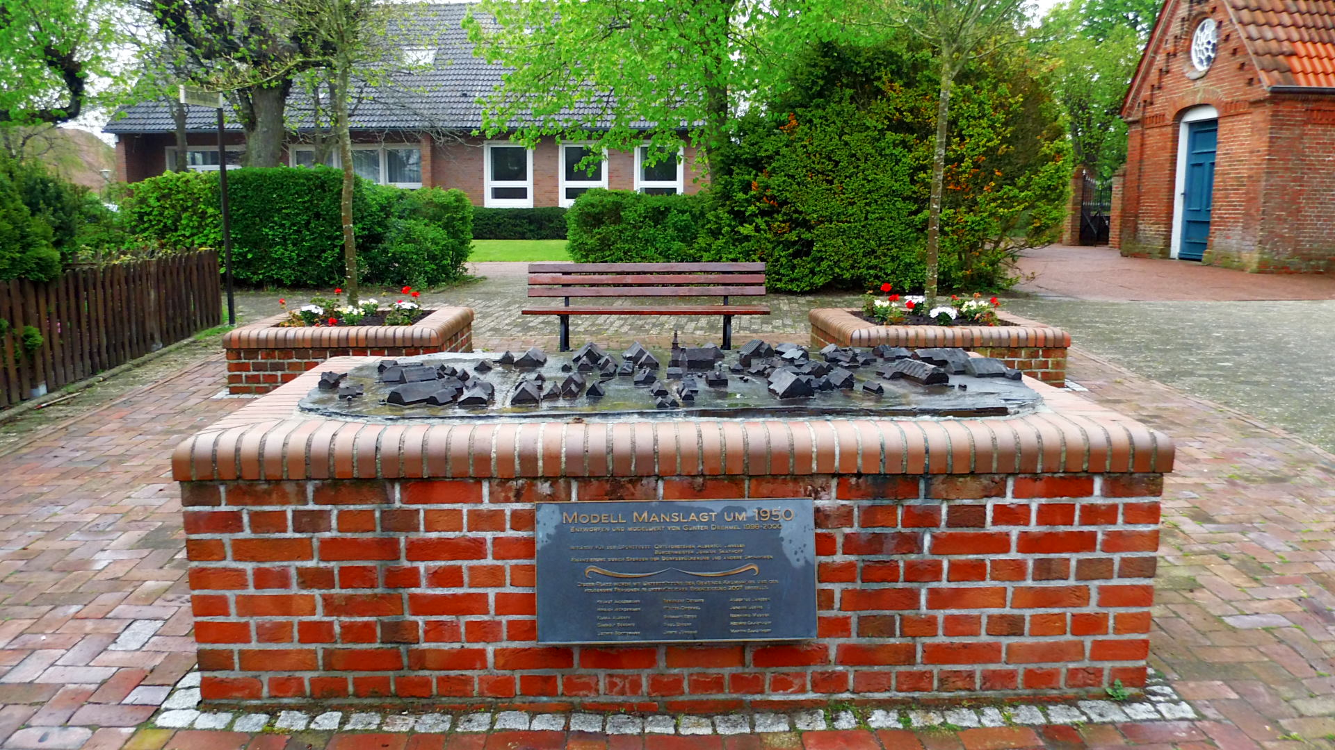 Bronzemodell (1950) des Dorfes Manslagt, Gemeinde Krummhörn, Niedersachsen, Deutschland